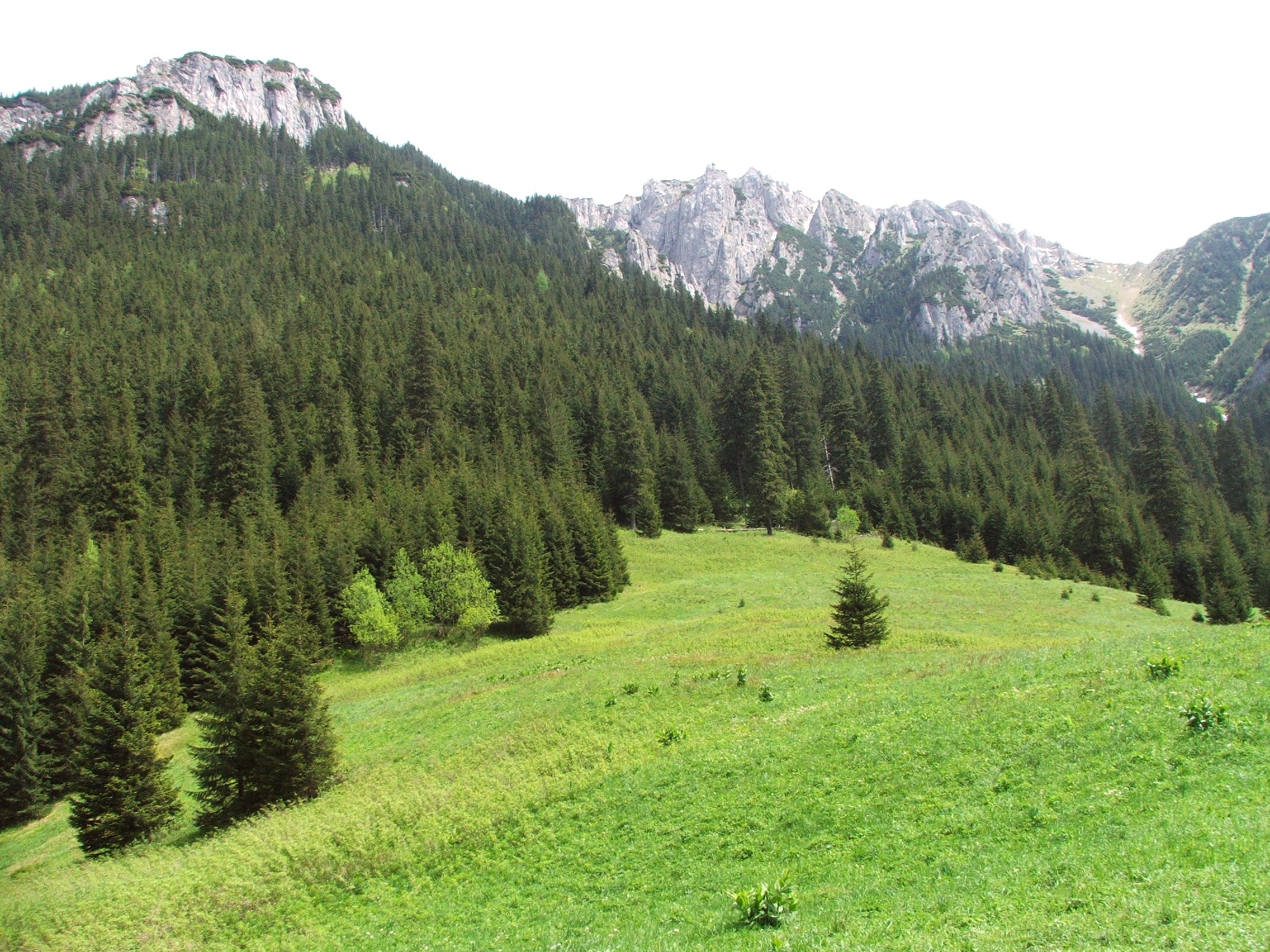 Organy i Zdziary - widok z Polany Pisanej